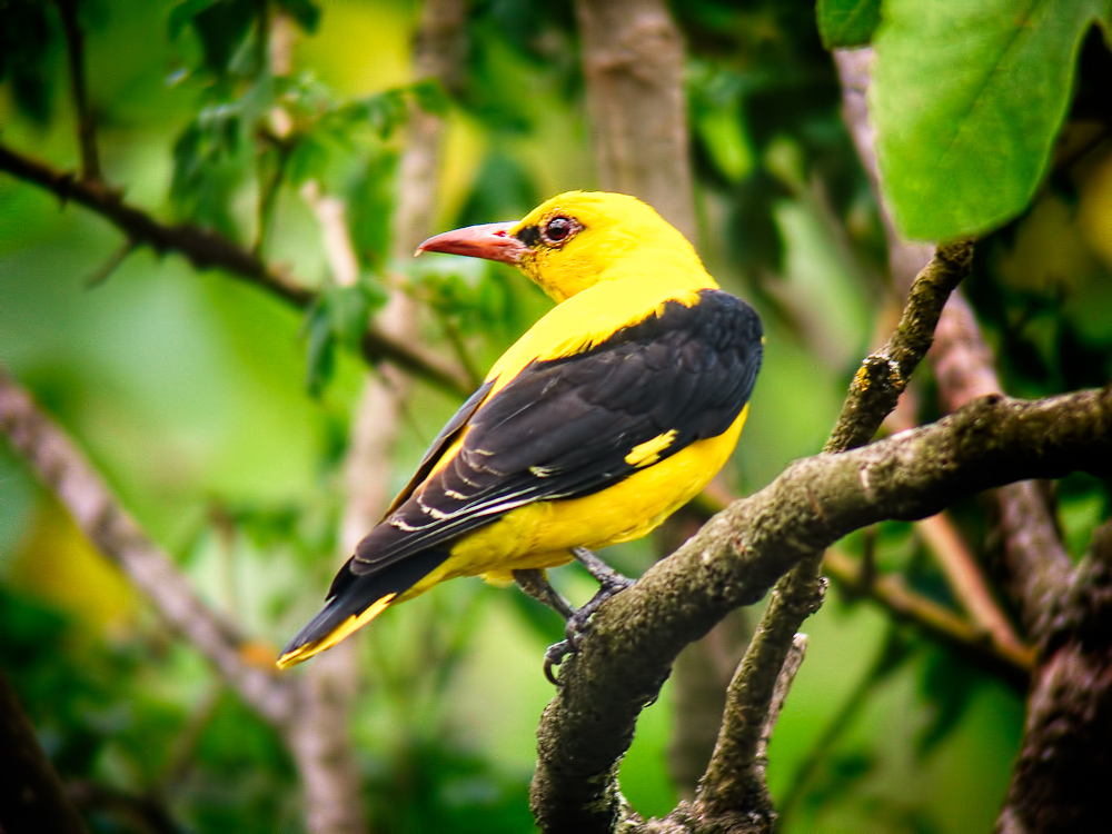 Oropéndola Oriolus oriolus macho, Ayódar, Valencia, Spain